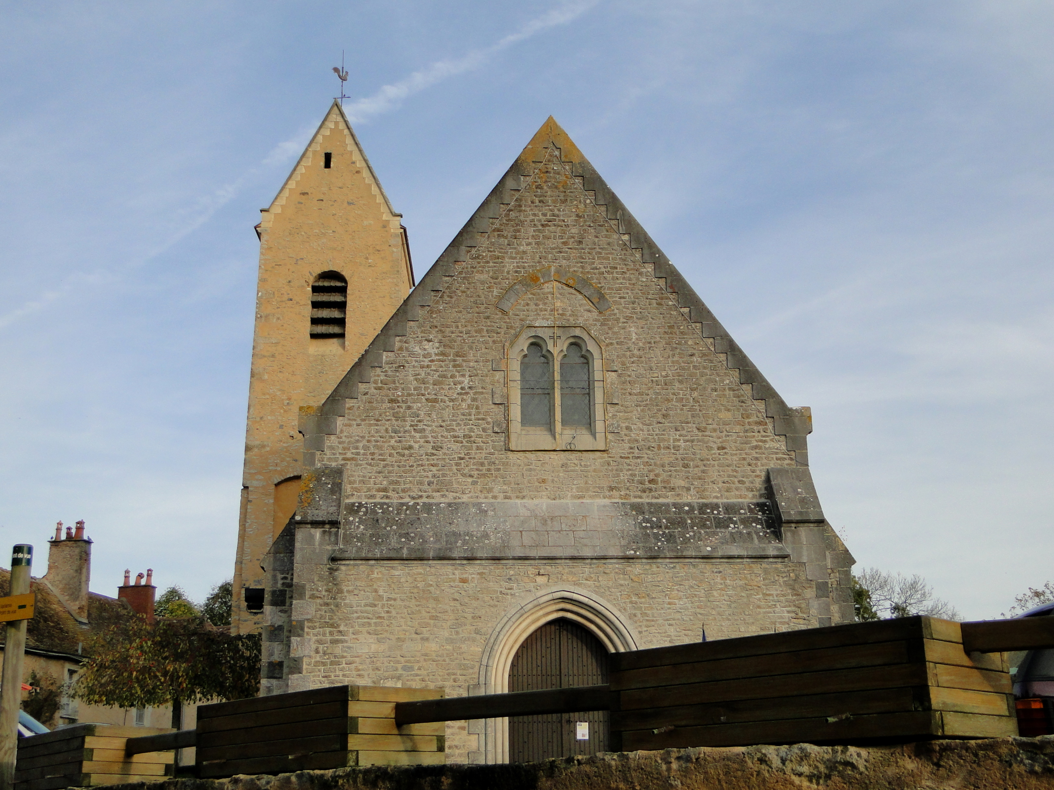 Eglise Saint-Martin de Juigné-sur-Sarthe